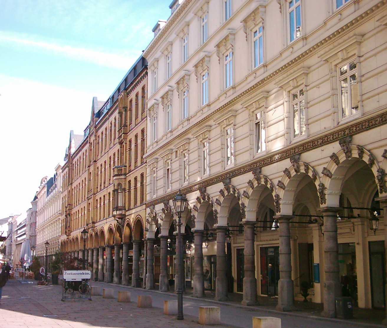 Die Colonnaden in Hamburg-Neustadt.